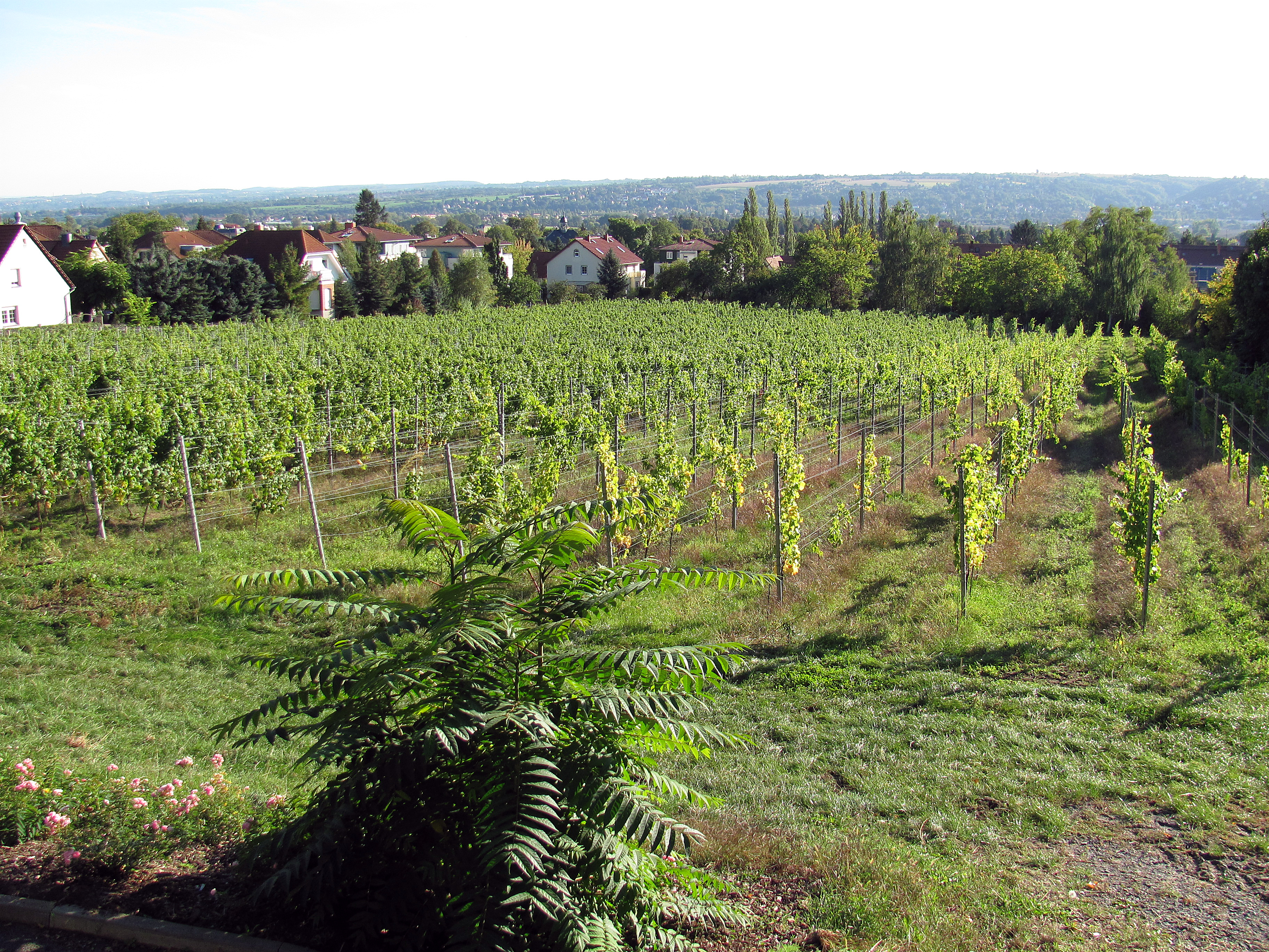 Radebeul, als Werk der Landschafts- und Gartengestaltung geschützter Weingarten unterhalb der Straße (unterhalb Minckwitzscher Weinberg, nicht zu jenem gehörig)